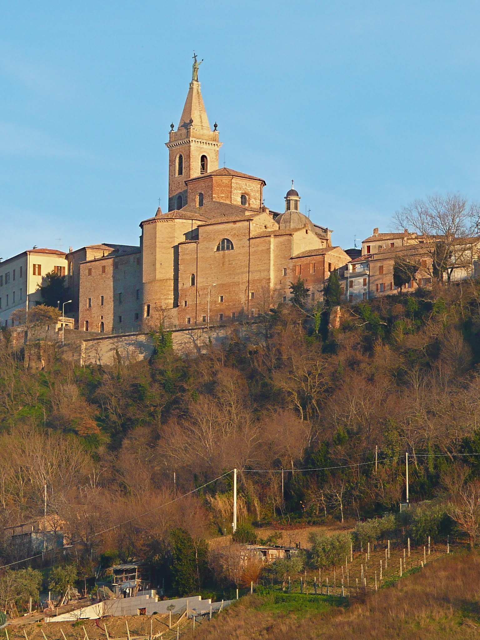 Duomo di Ripatransone